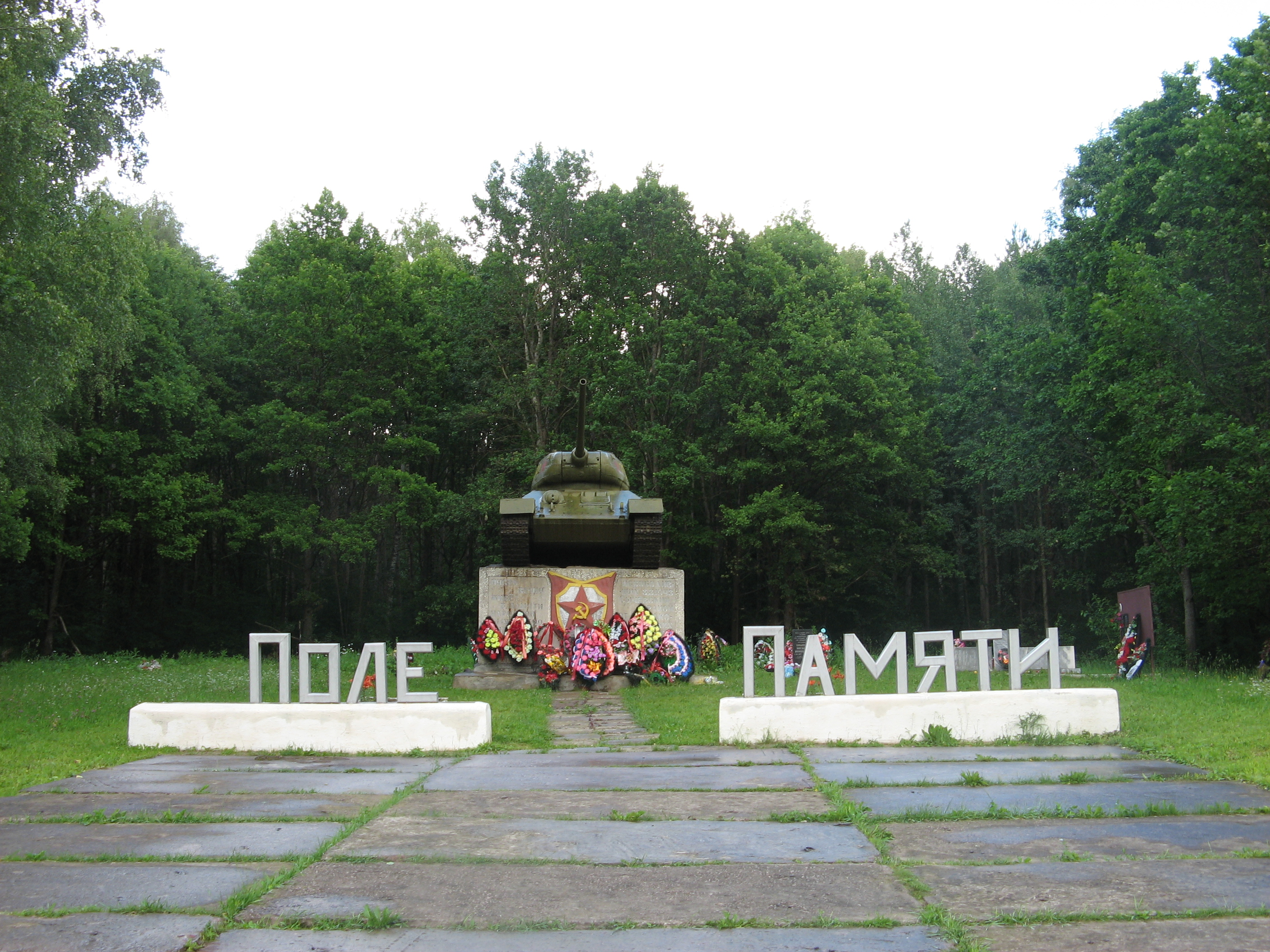 Танк при въезде в город.